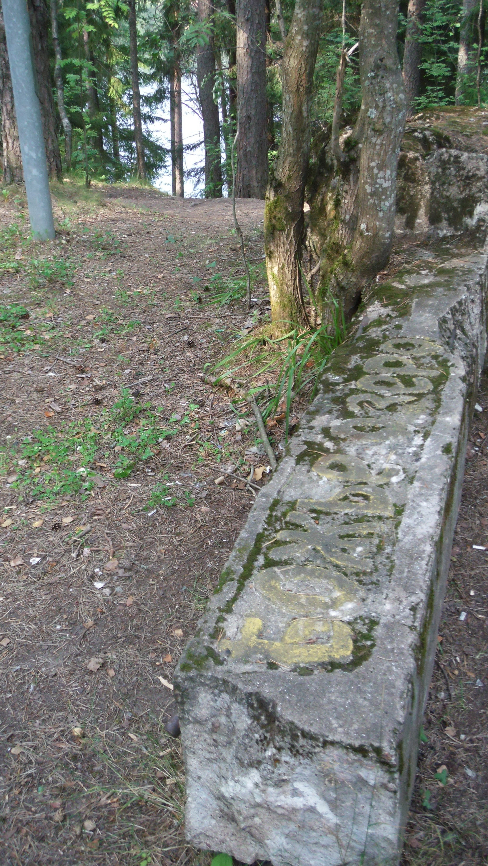 В Зеленогорске Санкт-Петербурга есть Дружинное озеро, в народе его называют Чёртово озеро, а когда-то оно называлось, видимо, Божье озеро, о чём свидетельствует надпись на бетонном столбе.